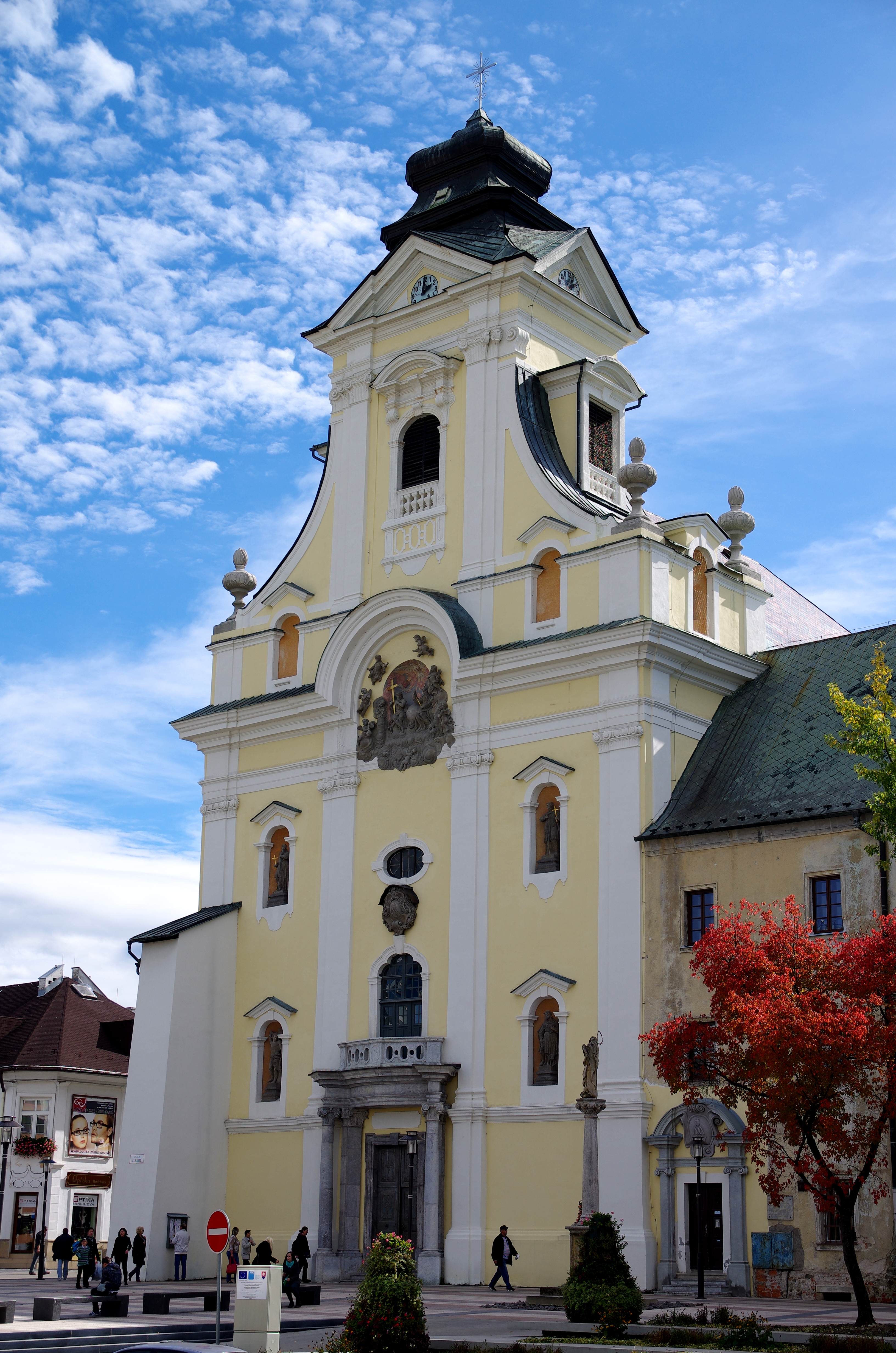 Kostol Najsvätejšej Trojice a Nanebovzatia Panny Márie v Prievidzi